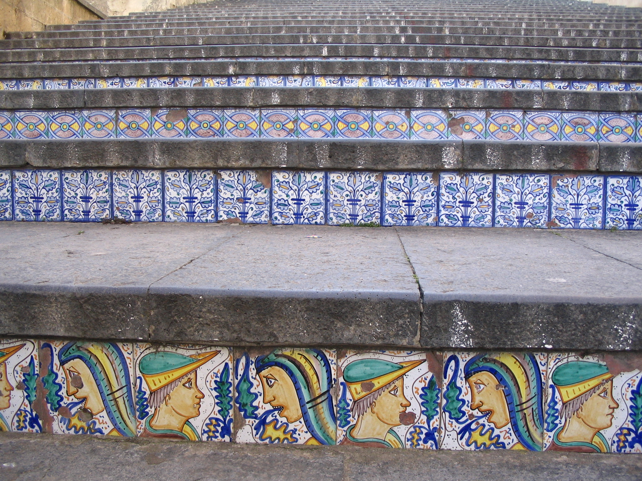 Escalier de Santa Maria del Monte - Caltagirone - Sicile - Marches de la partie supérieure.